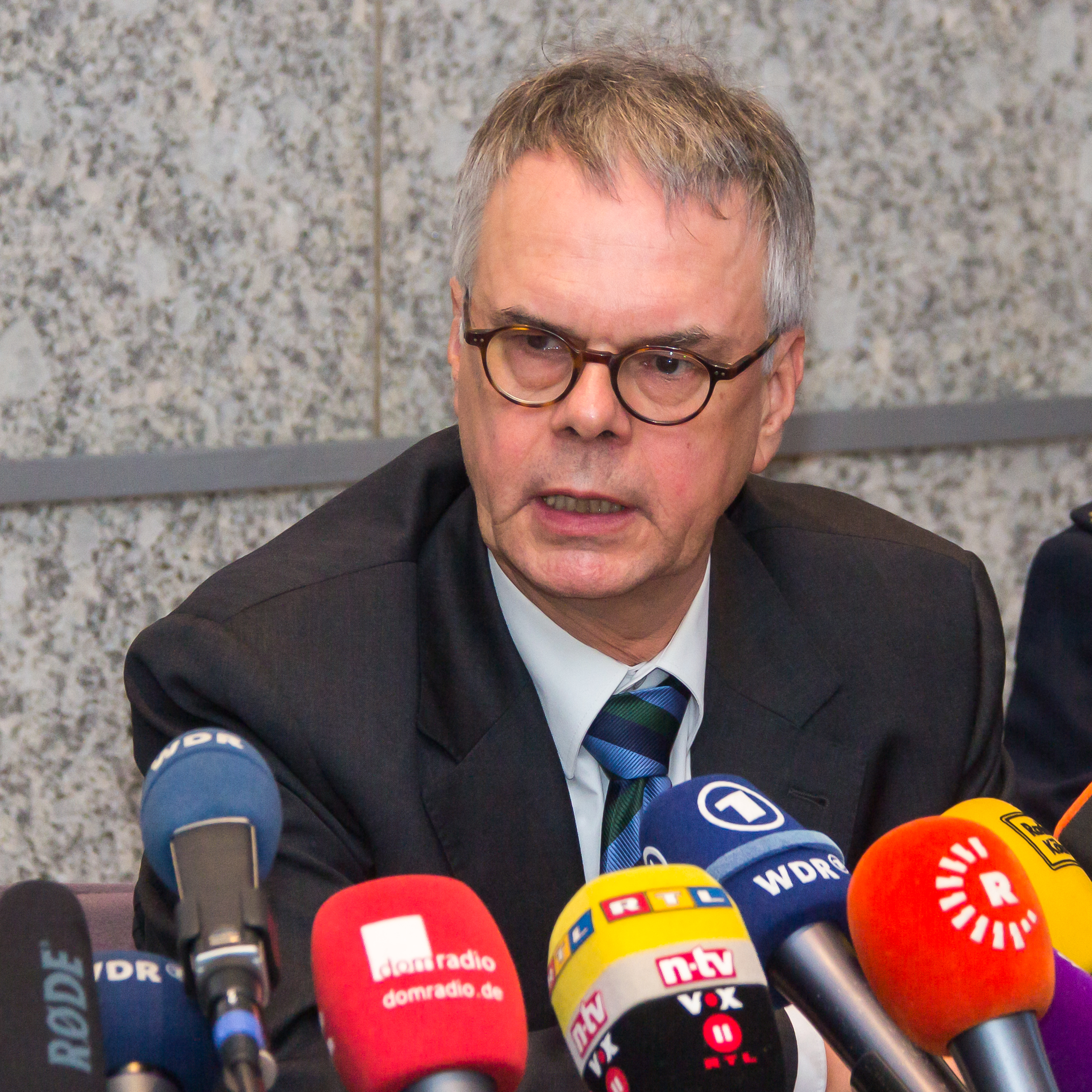 Pressekonferenz im Rathaus Köln zu den Vorgängen in der Silversternacht 2015/16 Foto: Polizeipräsident Wolfgang Albers